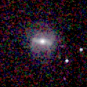 Galaxy NGC 47